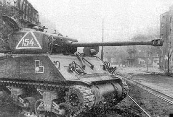 Tank Sherman M4A2 ve Vídni - 1945